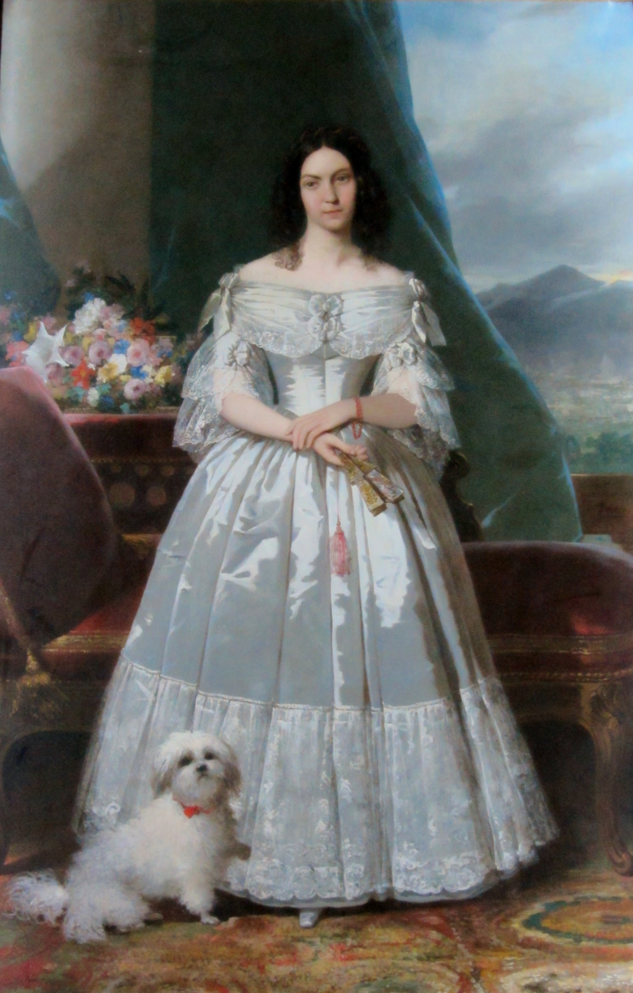 Retrato de una dama peruana